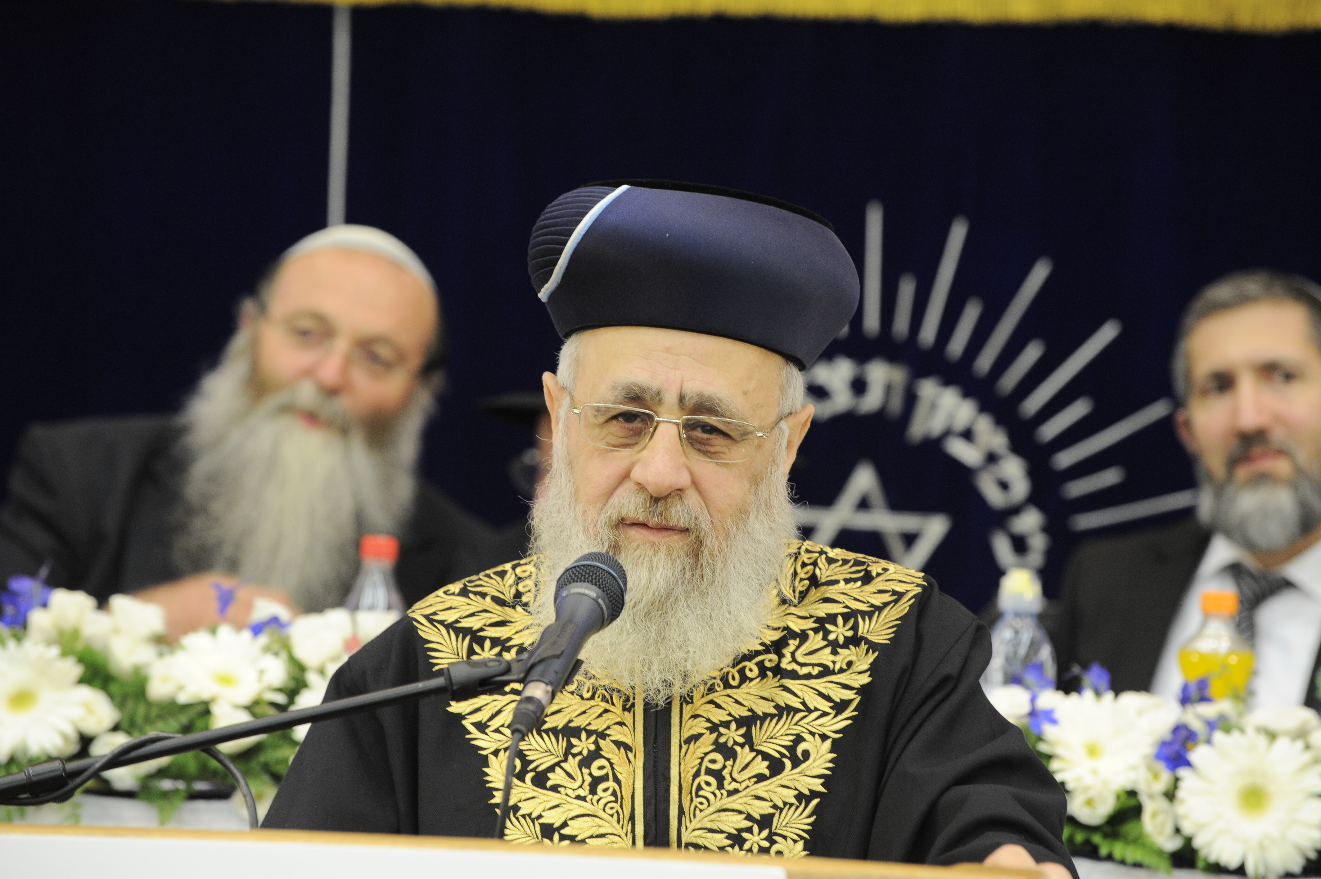 ישיבת מרכז הרב.